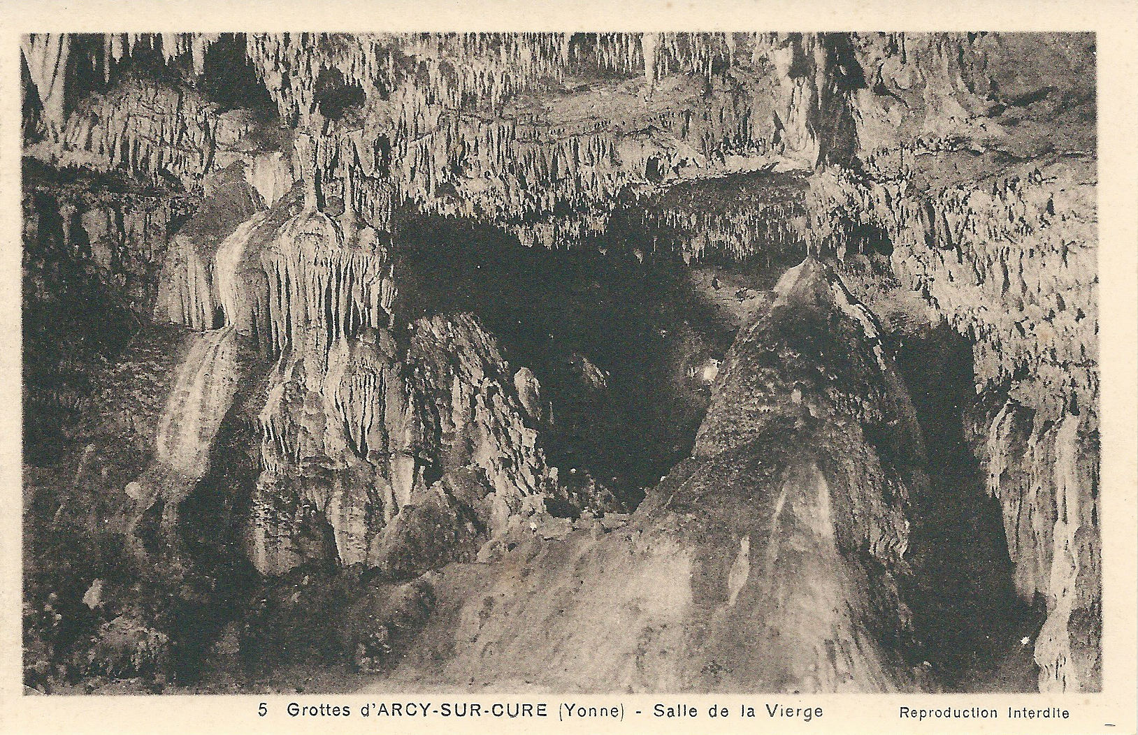 Grande grotte, site d'Arcy-sur-Cure, Yonne, Bourgogne, France ; "Salle de la Vierge" (ancien nom). Carte postale des grottes, vers 1937 (et avant 1939)